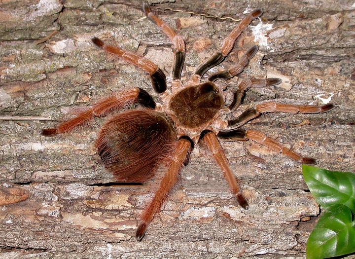 Megaphobema robustum female